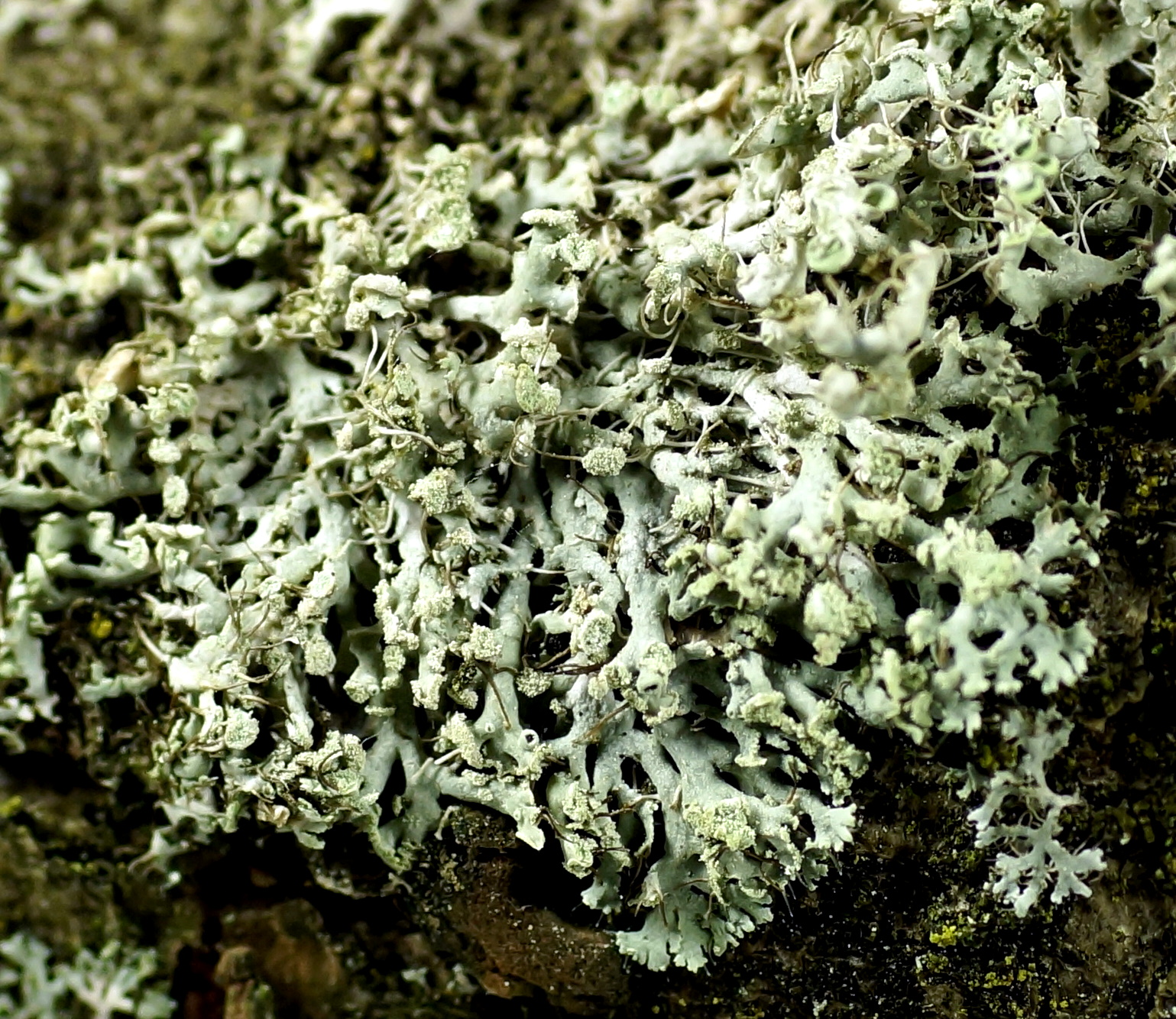 Zarte Schwielenflechte, Lichenes, Deutschland, Bayern, Oberfranken, Selbitz Photo: U.Schmidt, 10.X.2012